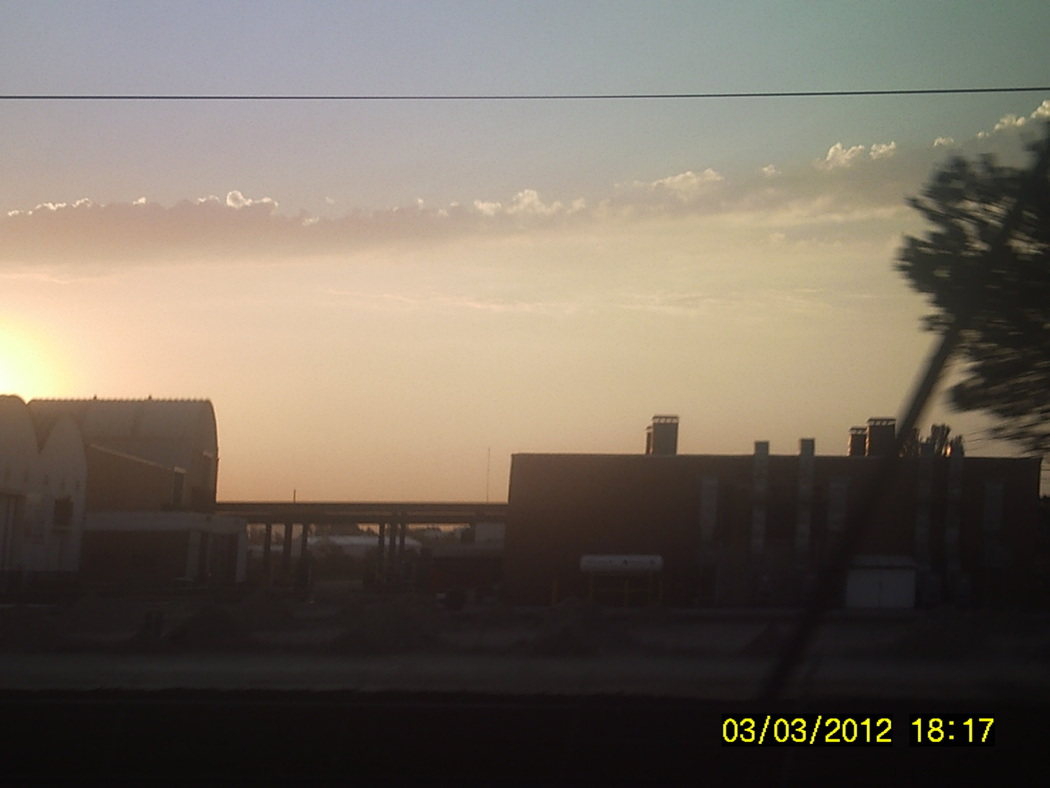 Una muestra de las fábricas de Ciudad Sahagún